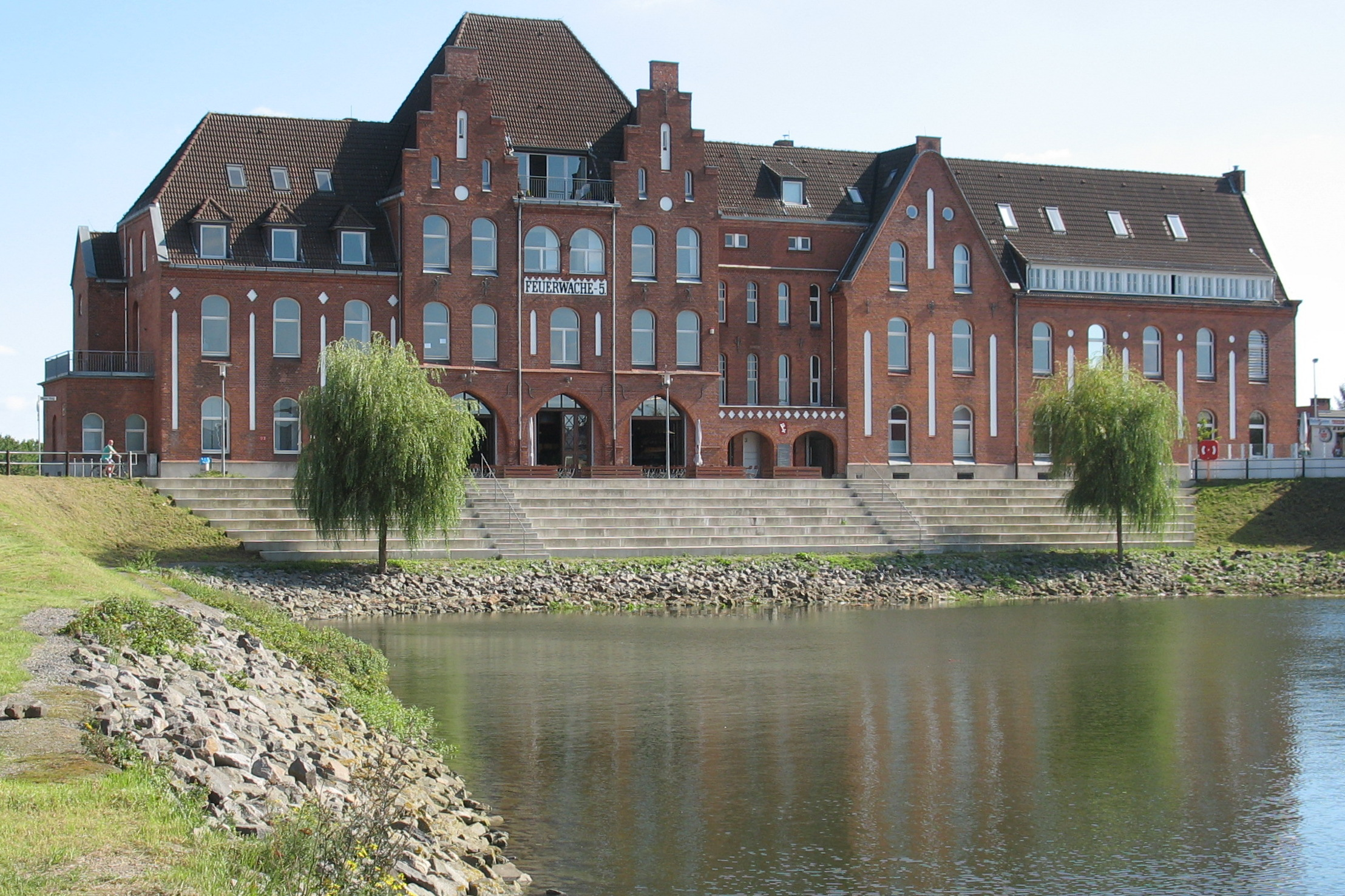 Altes Zollamt, Waller Stieg 1; Alte Feuerwache 5, Waller Stieg 3